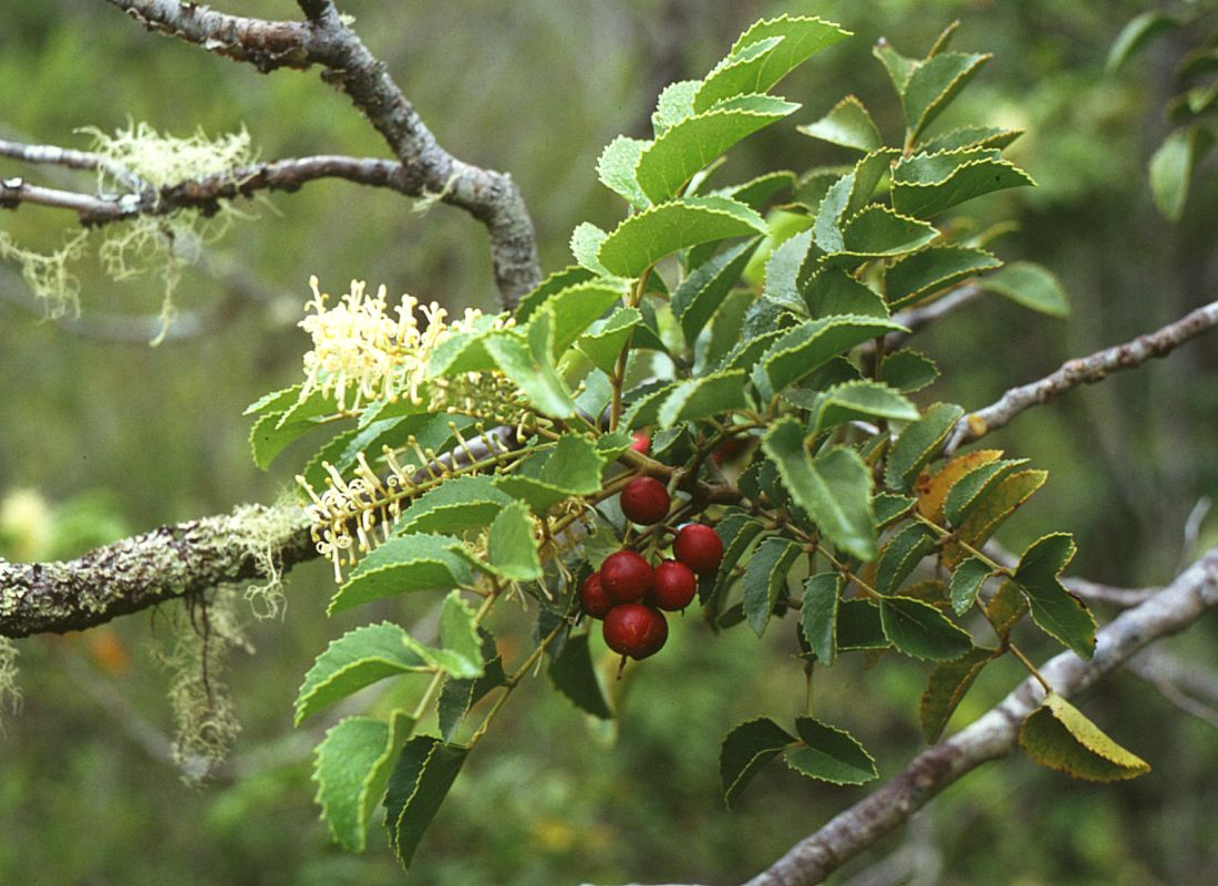 Gevuina avellana, Proteaceae - Chile, Salto de Petrohué (Prov. de Llanquihue)